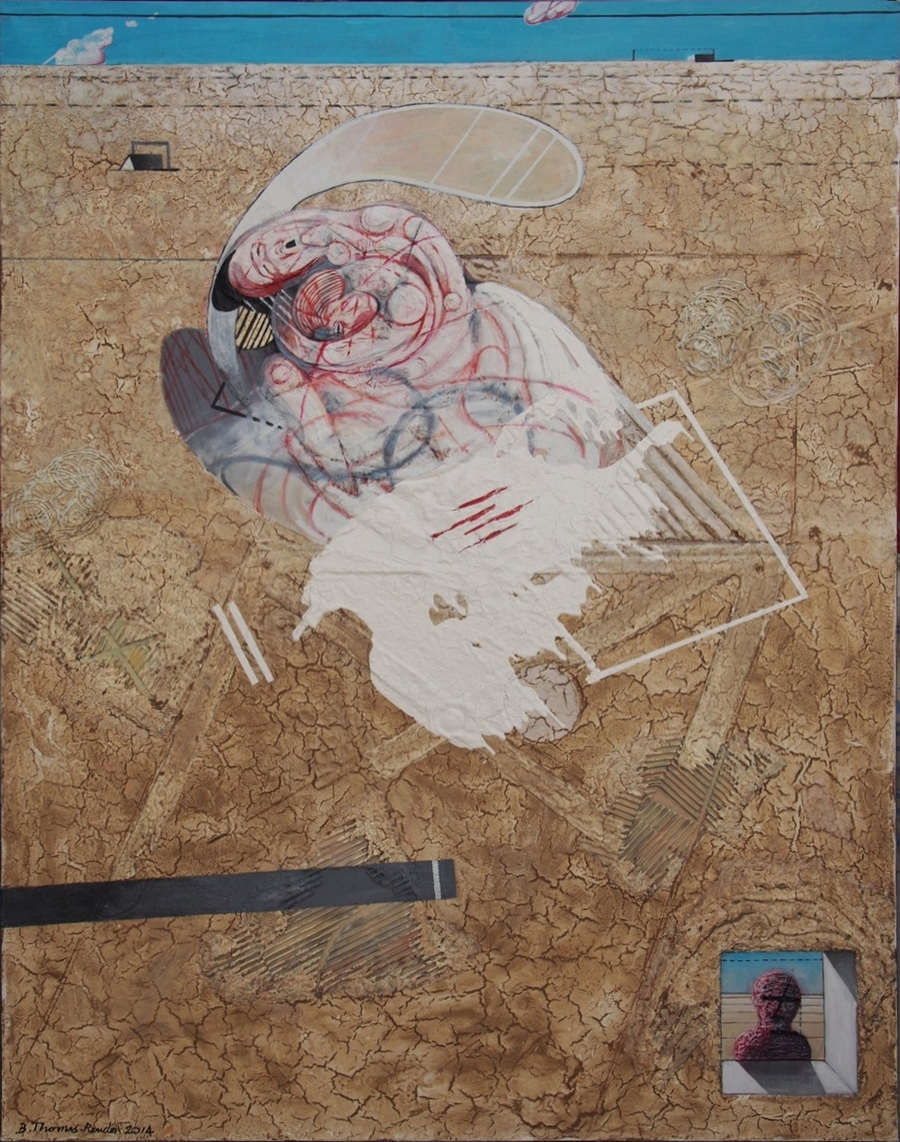 Tableau: Viol dans un champ dévasté